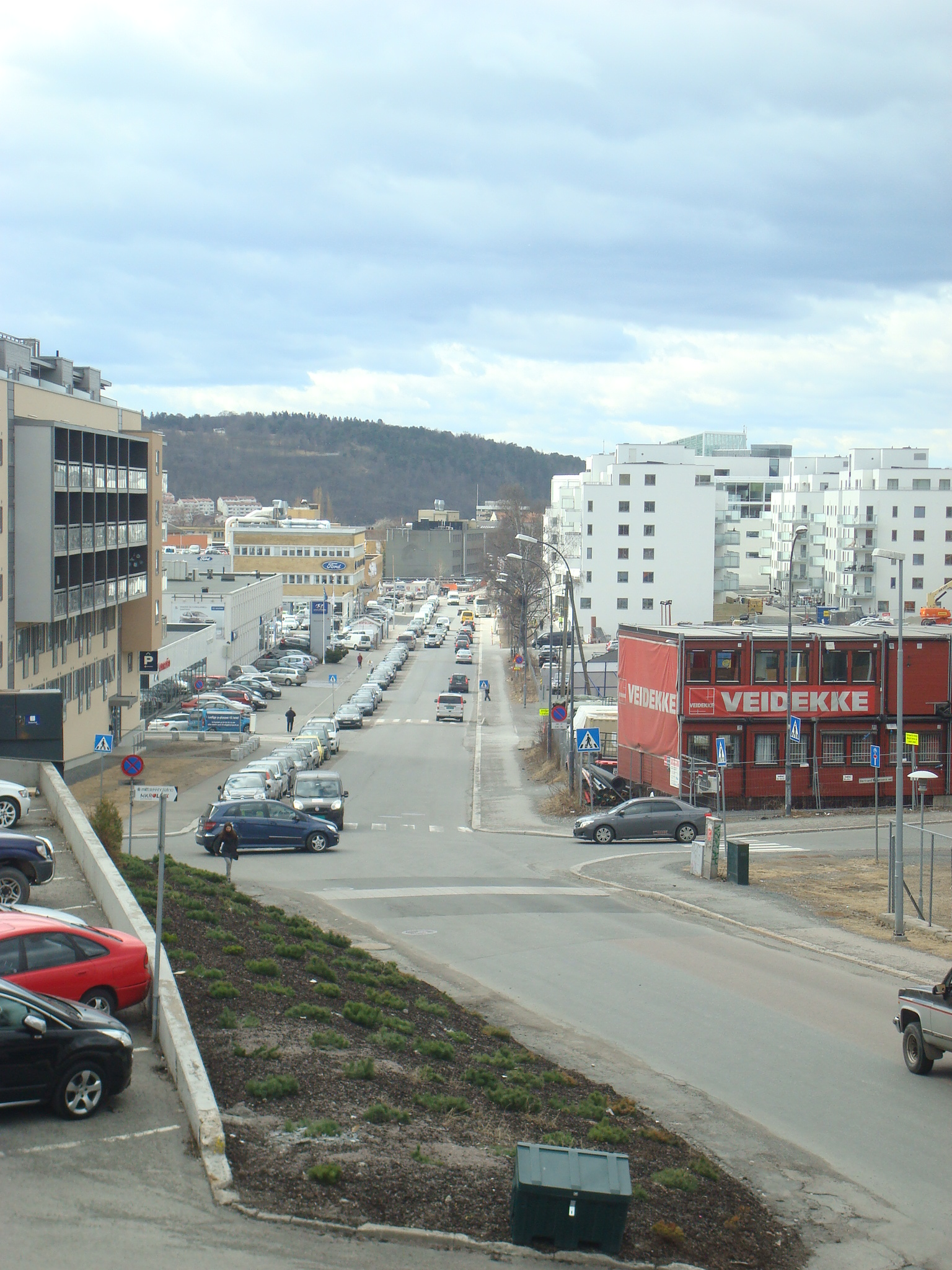 Gladengveien, sett nedover mot Ensjøveien.